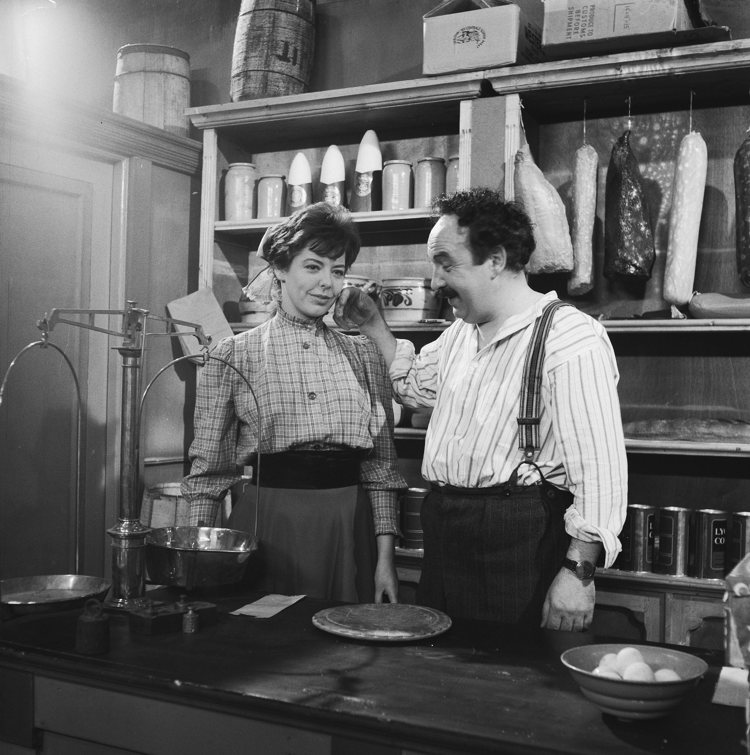 Collectie / Archief : Fotocollectie Anefo Reportage / Serie : [ onbekend ] Beschrijving : T. V. spel "Mijn hart is in het hoogland". Lex Goudsmit en [...] Datum : 20 april 1961 Persoonsnaam : Goudsmit, Lex Fotograaf : Lindeboom, Henk / Anefo Auteursrechthebbende : Nationaal Archief Materiaalsoort : Negatief (zwart/wit) Nummer archiefinventaris : bekijk toegang 2.24.01.03 Bestanddeelnummer : 912-3825